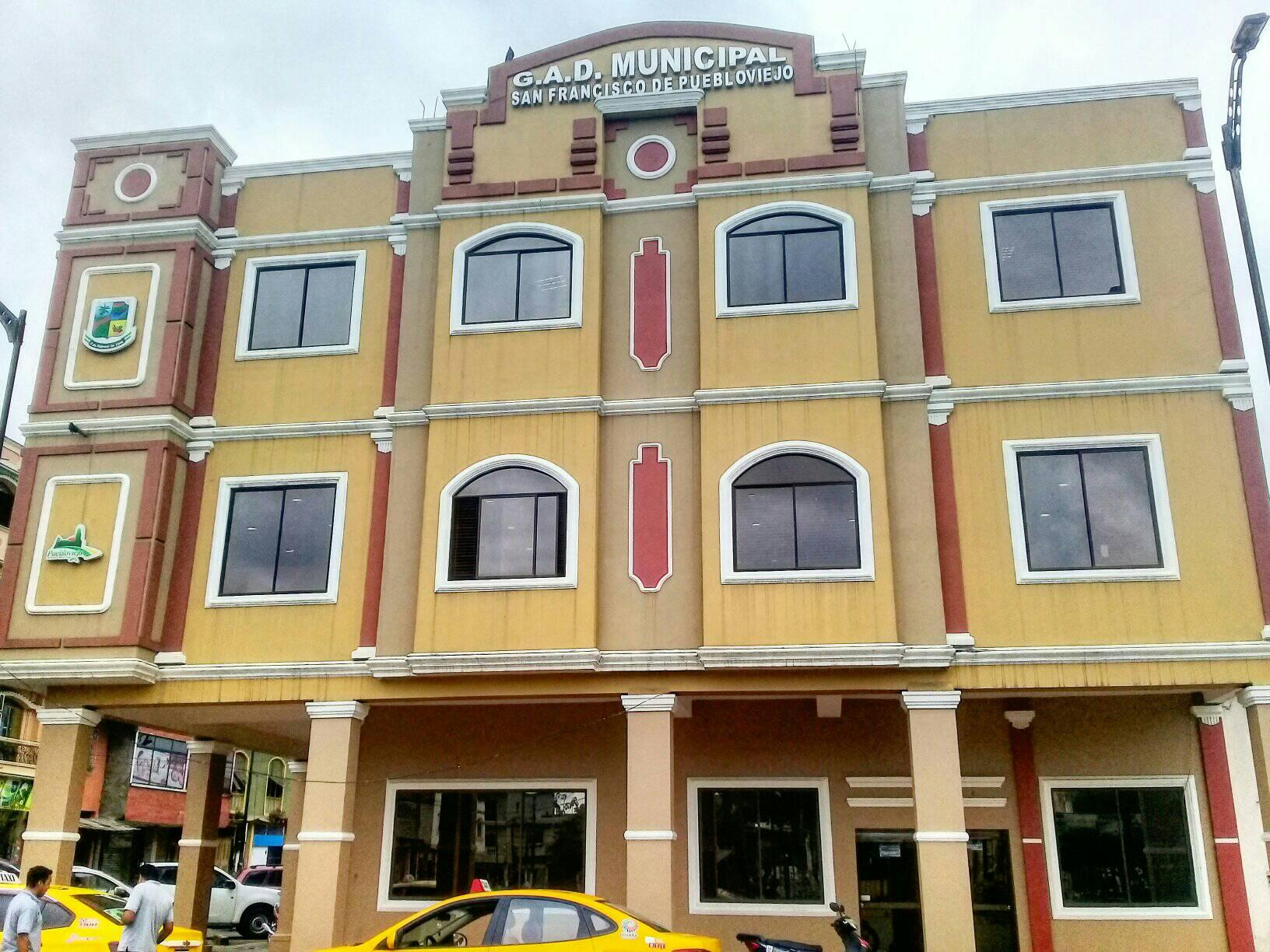 Ayuntamiento de Puebloviejo, Ecuador.